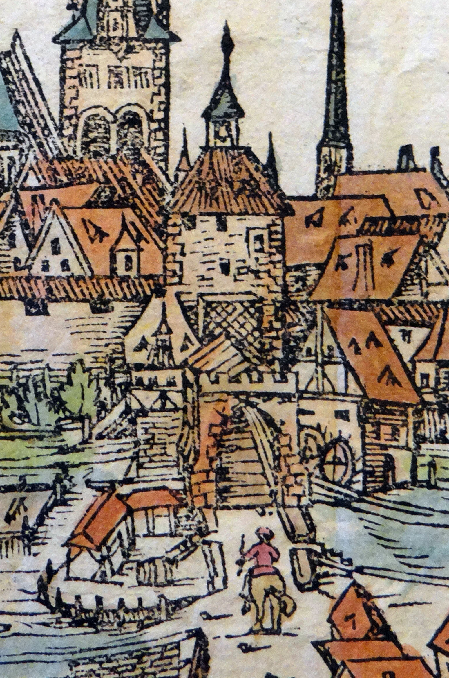 Rheinpforte, Woogübergang, Worms. Detail aus: Sebastian Münster: Cosmographey. Hencicpetrina, Basel 1572, S. DCXCIII–DCXCVI. Stadtarchiv Worms: Abt. 217 Nr. 1478.